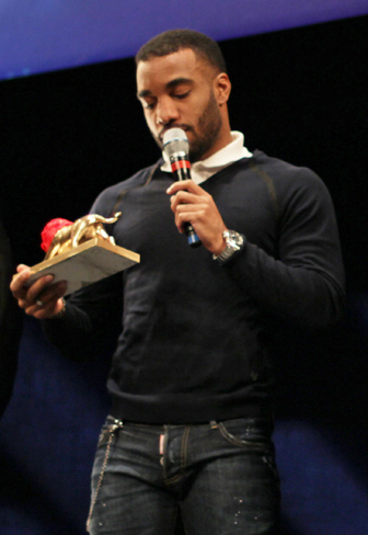 Alexandre Lacazette lors de la remise des Lions du Sport en février 2015 à Lyon. Il obtient le Lion d'or 2015.